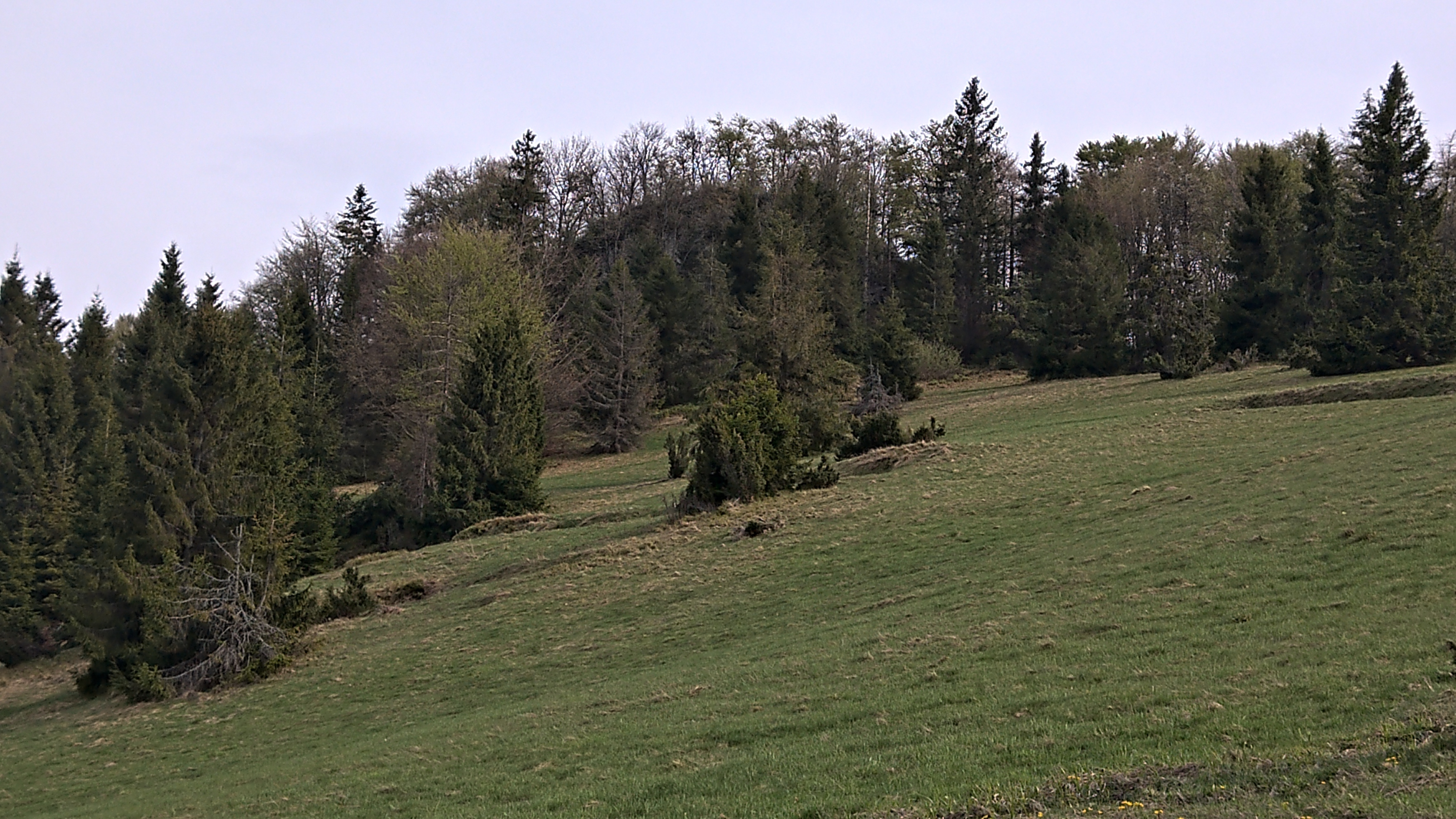 Widok na Jaworzynę (1001) z hal na jej zboczach. Wśród drzew widoczny zarys wapiennej skały stanowiącej szczyt.